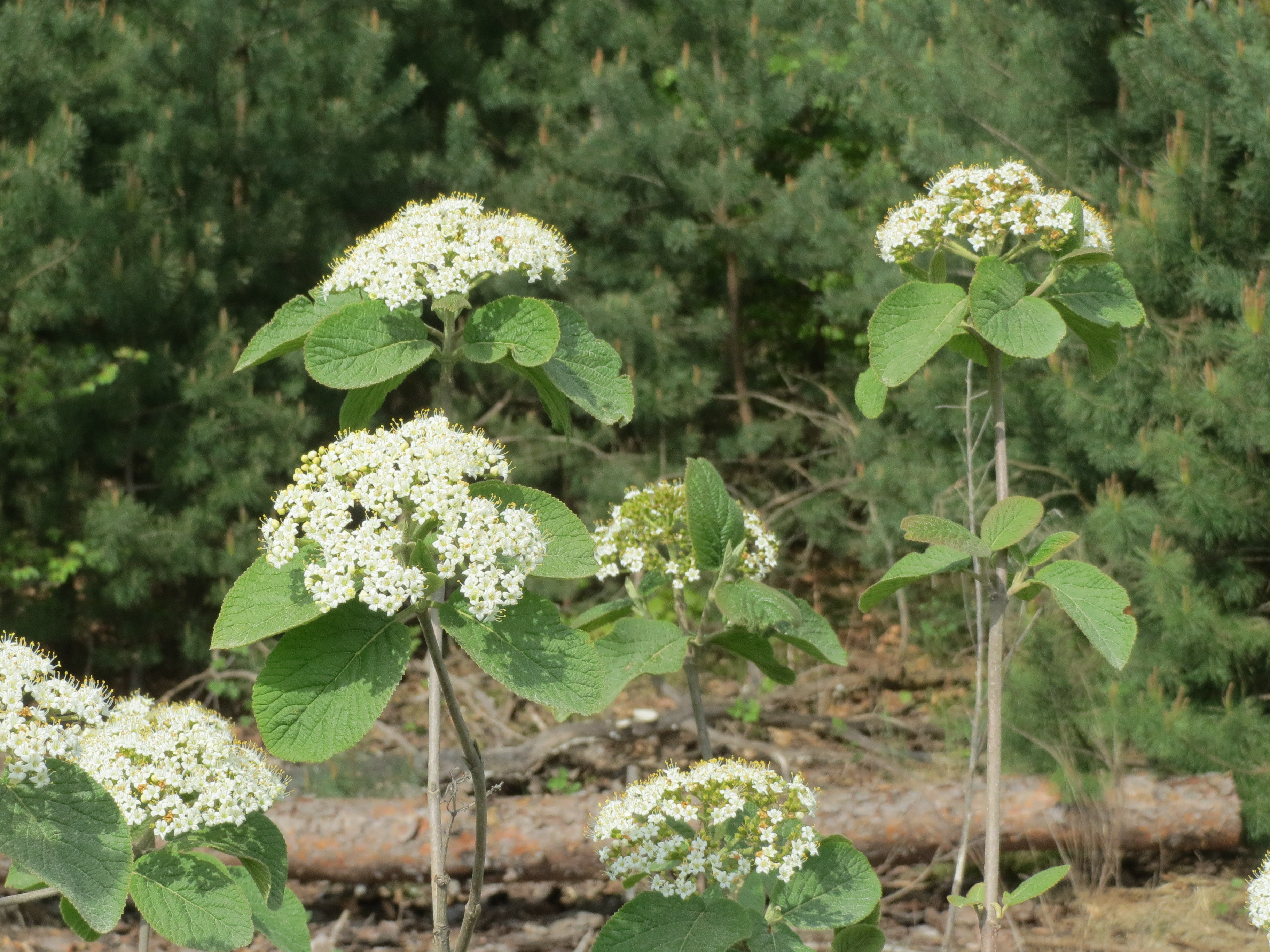 Wolliger Schneeball (Viburnum lantana) im Schwetzinger Hardt